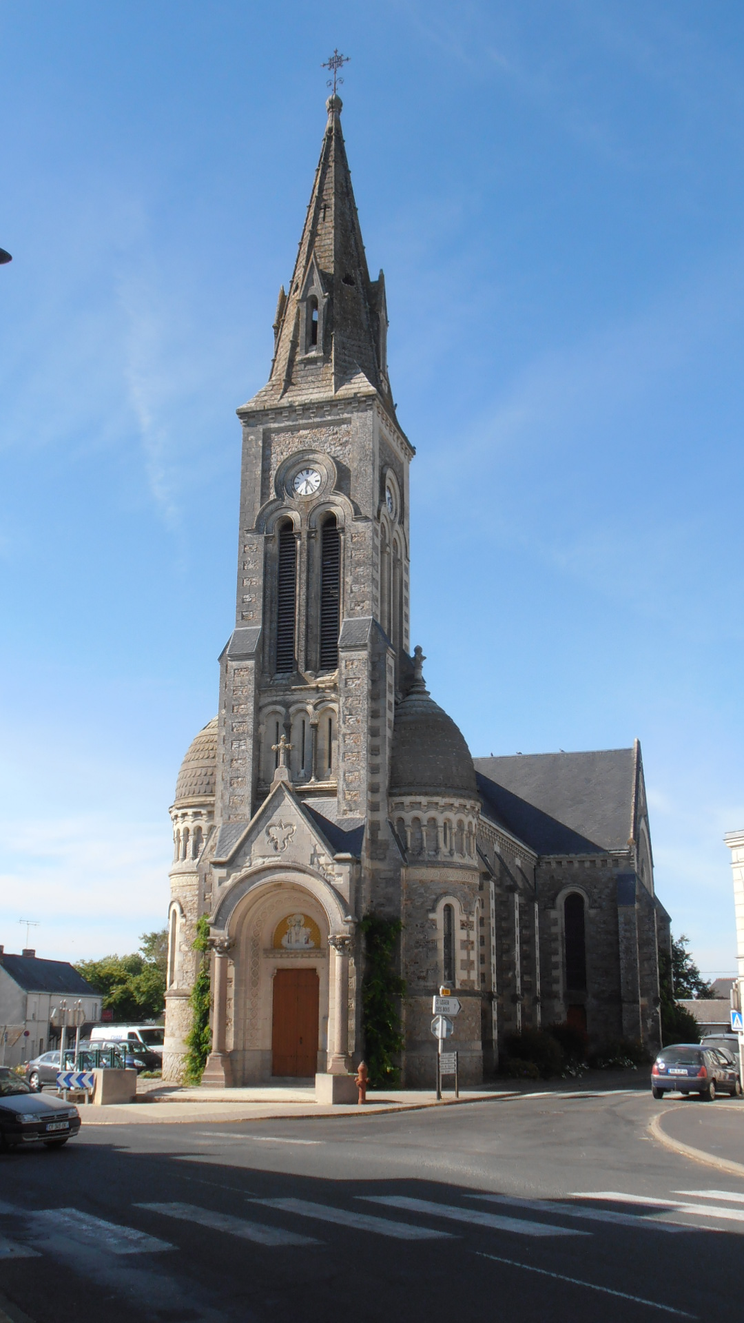 l'église du village de saint augustin des bois.